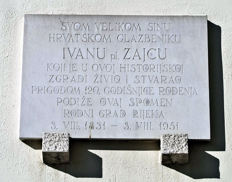 Spomen ploča Ivanu Zajcu, Rijeka